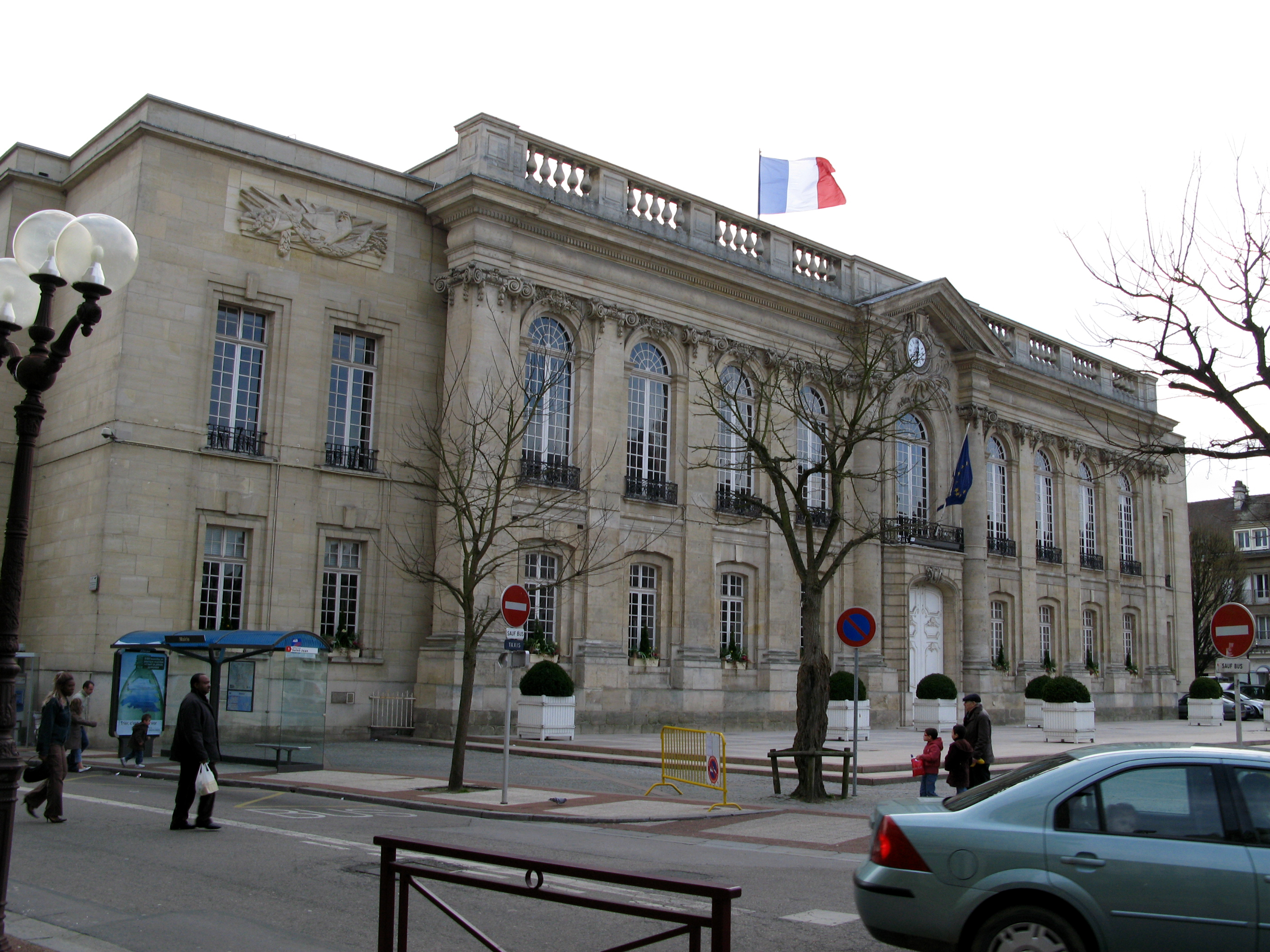 Beauvais (Oise, France) - L'Hôtel-de-ville, vu en débouchant de la rue de la Madeleine sur la place Jeanne Hachette. La voiture qui passe vient de la rue Malherbe, à gauche.